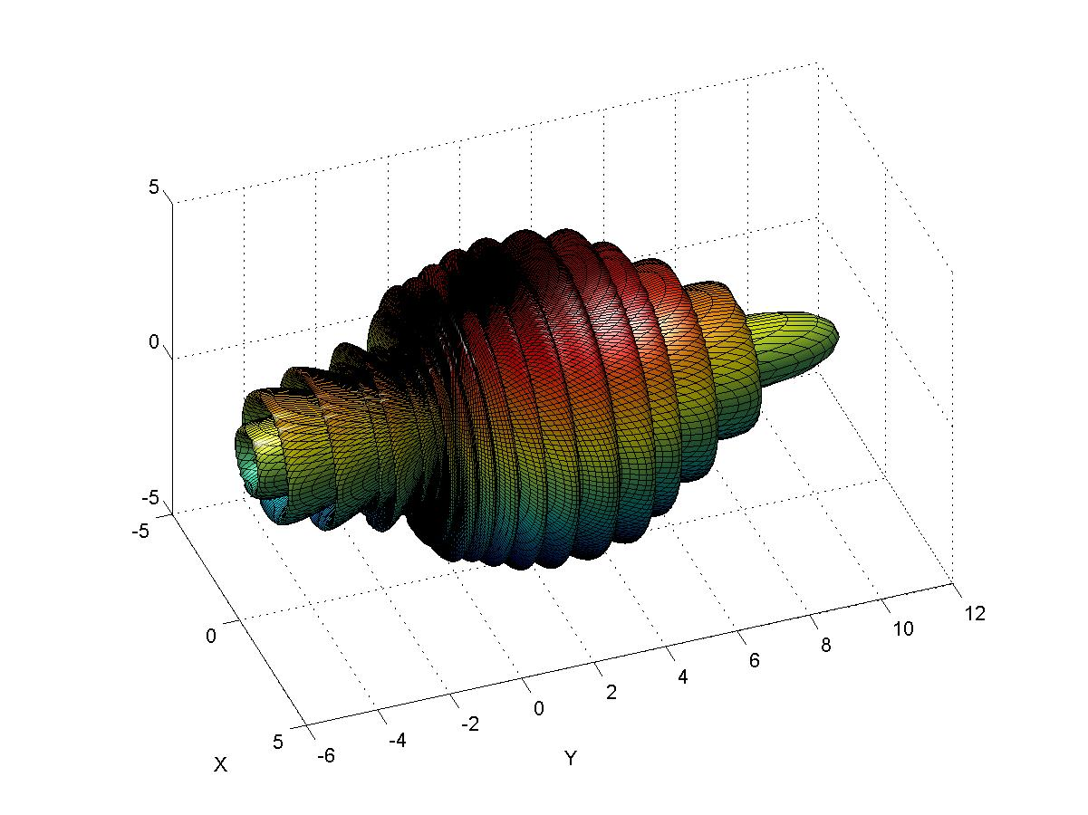 3 Dimensionale Darstellung der Mie Streuung von Licht mit 633nm an einer 2µm Kugel